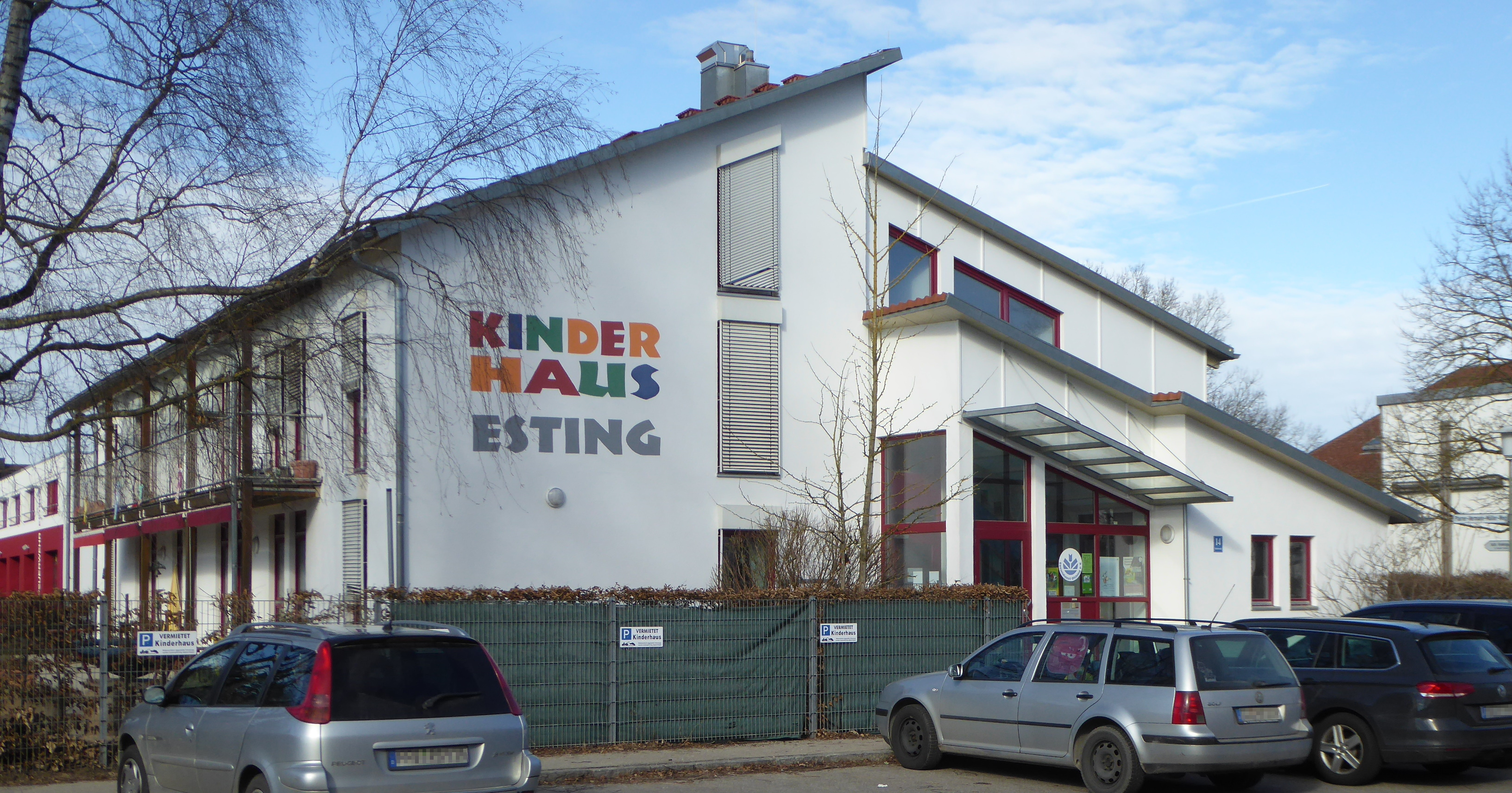 Esting, das Kinderhaus von Südosten.